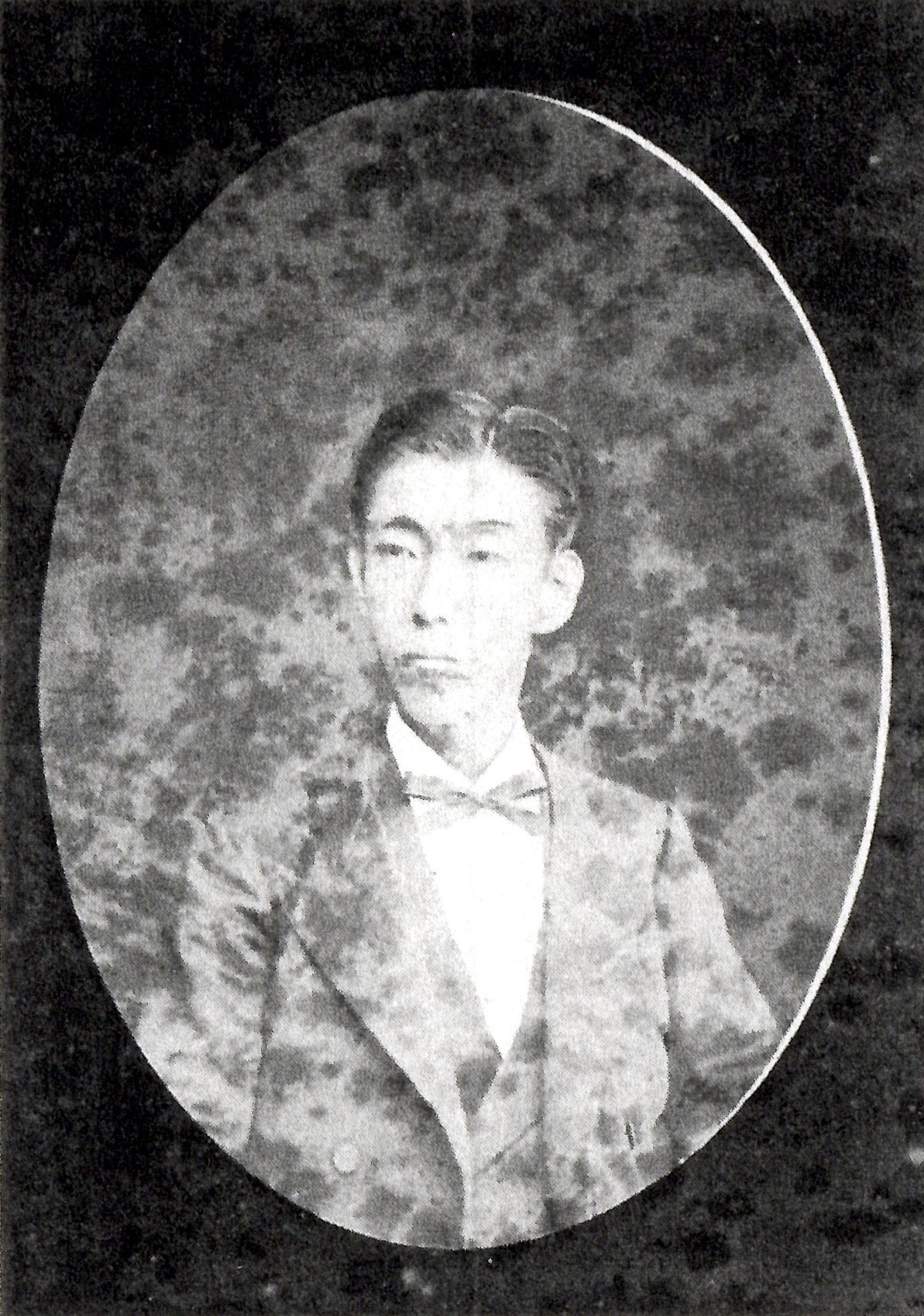 中川久成の肖像写真。